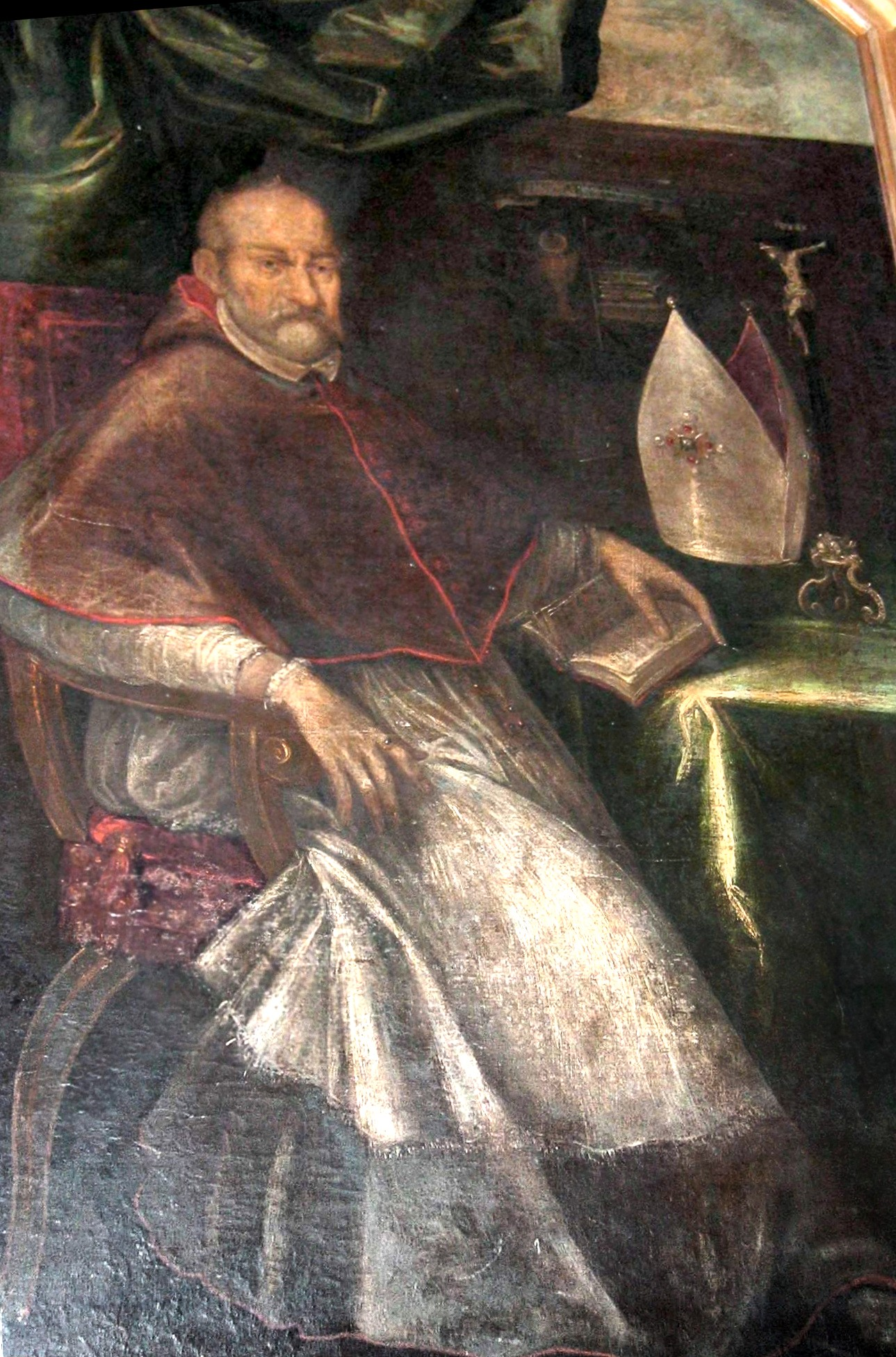 Bishop of Kraków Piotr Myszkowski, anonymous painting of XVI century image taken by user:Mathiasrex Maciej Szczepańczyk